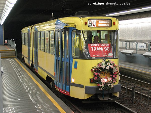 Laatste rit van de Brusselse tramlijn 90.